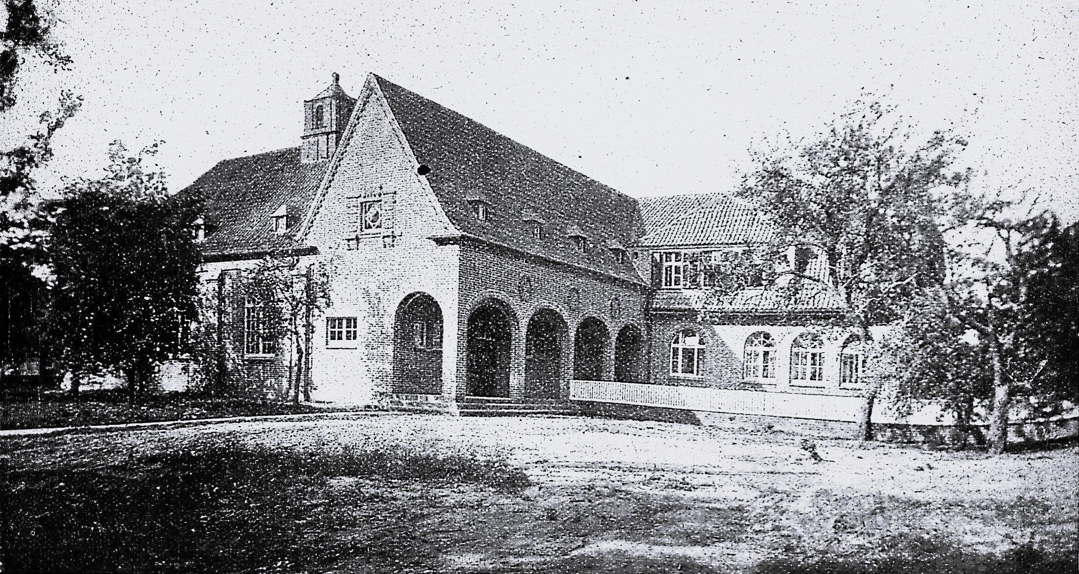 Der neue Gemeindesaal St. Lorenz Süd.